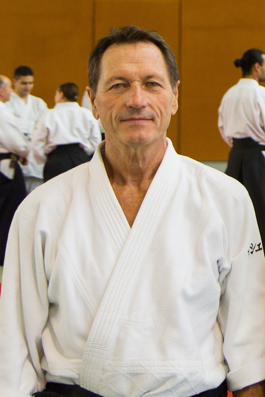 Christina Tissier Shiha, Décembre 2013